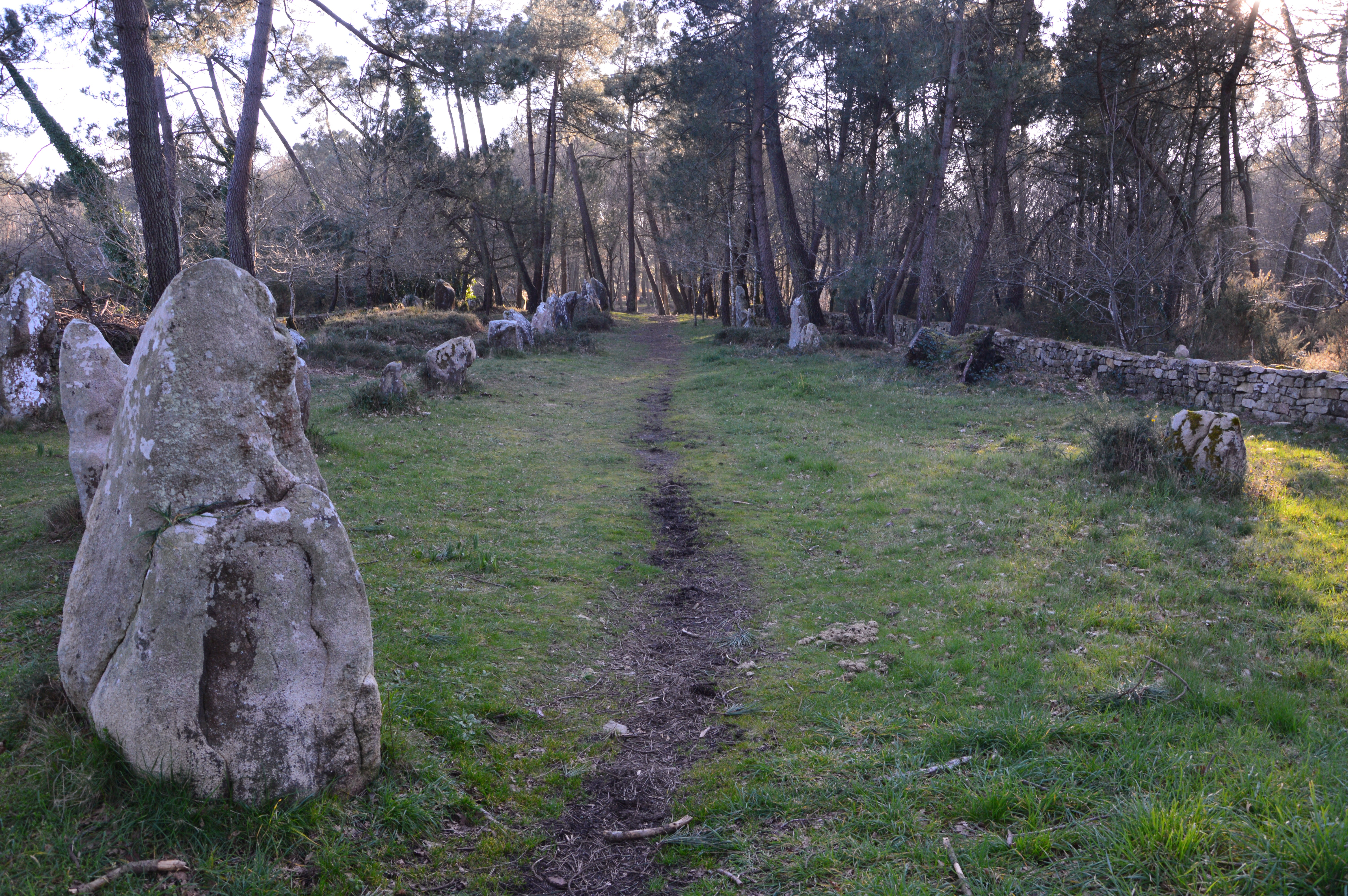 Succession de menhirs dits alignements du Petit-Ménec. Ces pierres font partie des alignements de Carnac (France).